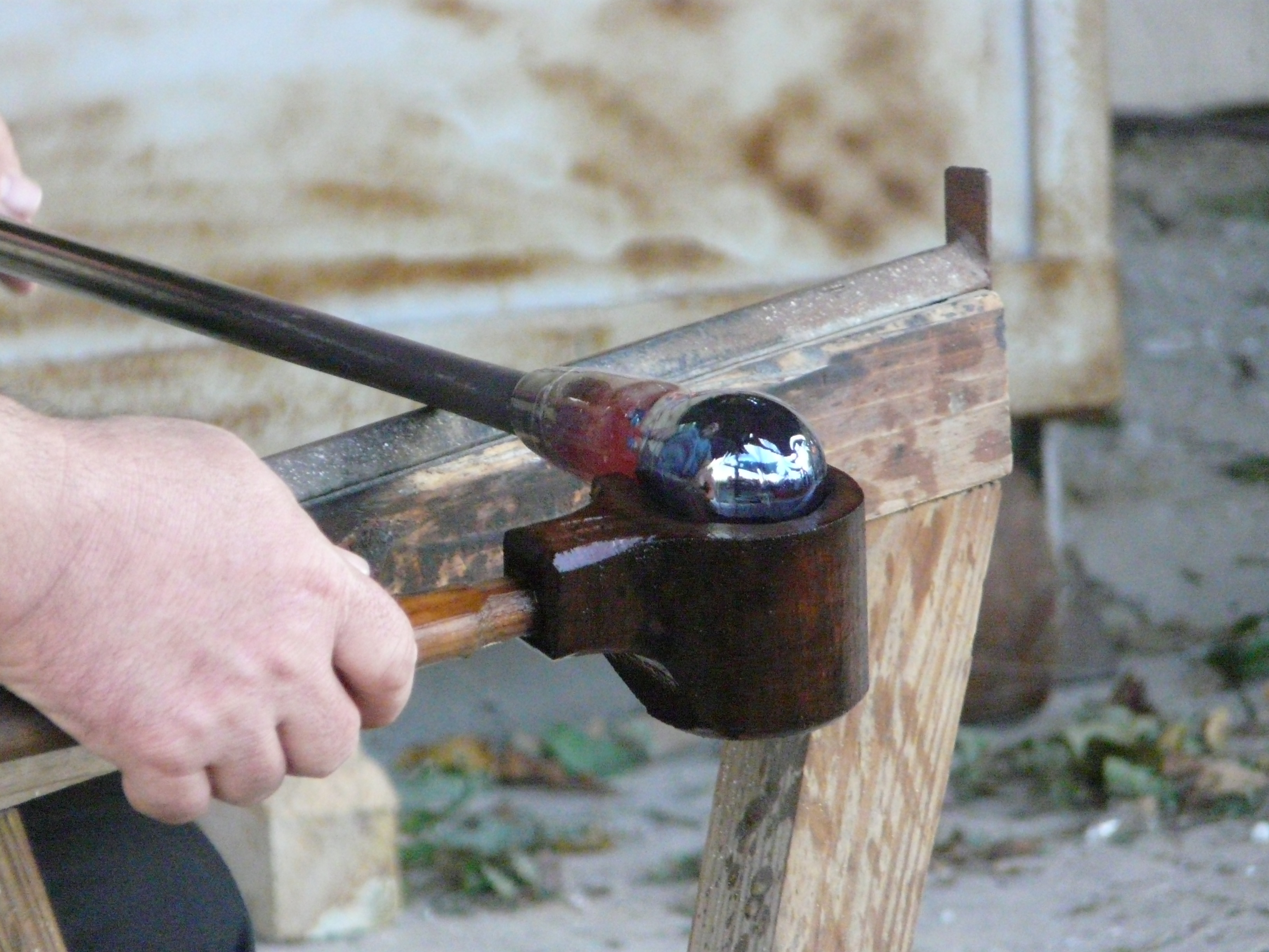 Renaissance fair near Pittsburgh